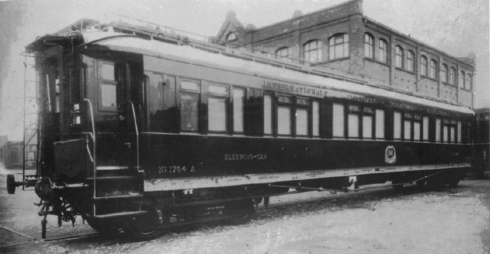 CIWL-Schlafwagen 1764A, 1908 von MAN gebaut, Werksaufnahme